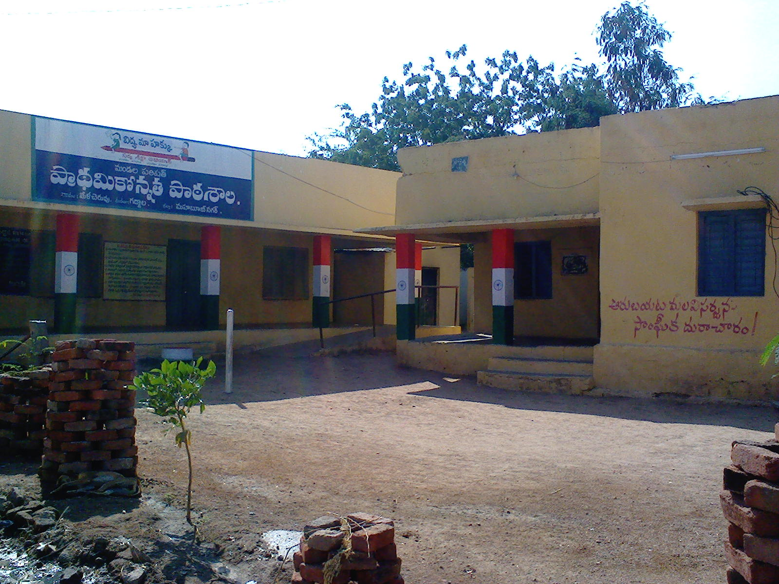 ప్రాథమికోన్నత పాఠశాల, మేళ్ళచెరువు